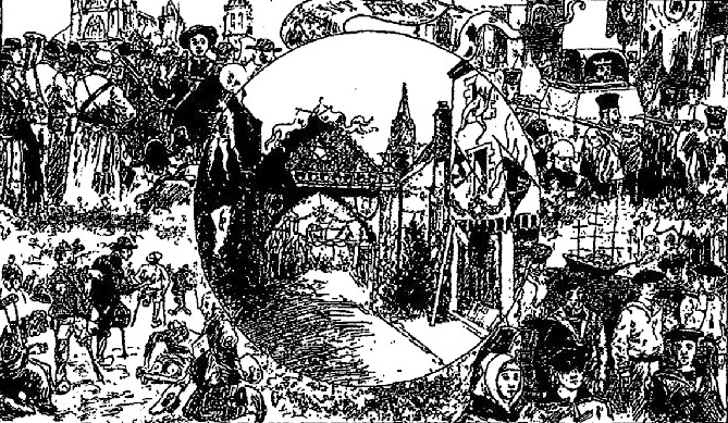 Dessin des Fêtes de saint-Yves à Tréguier vers 1890